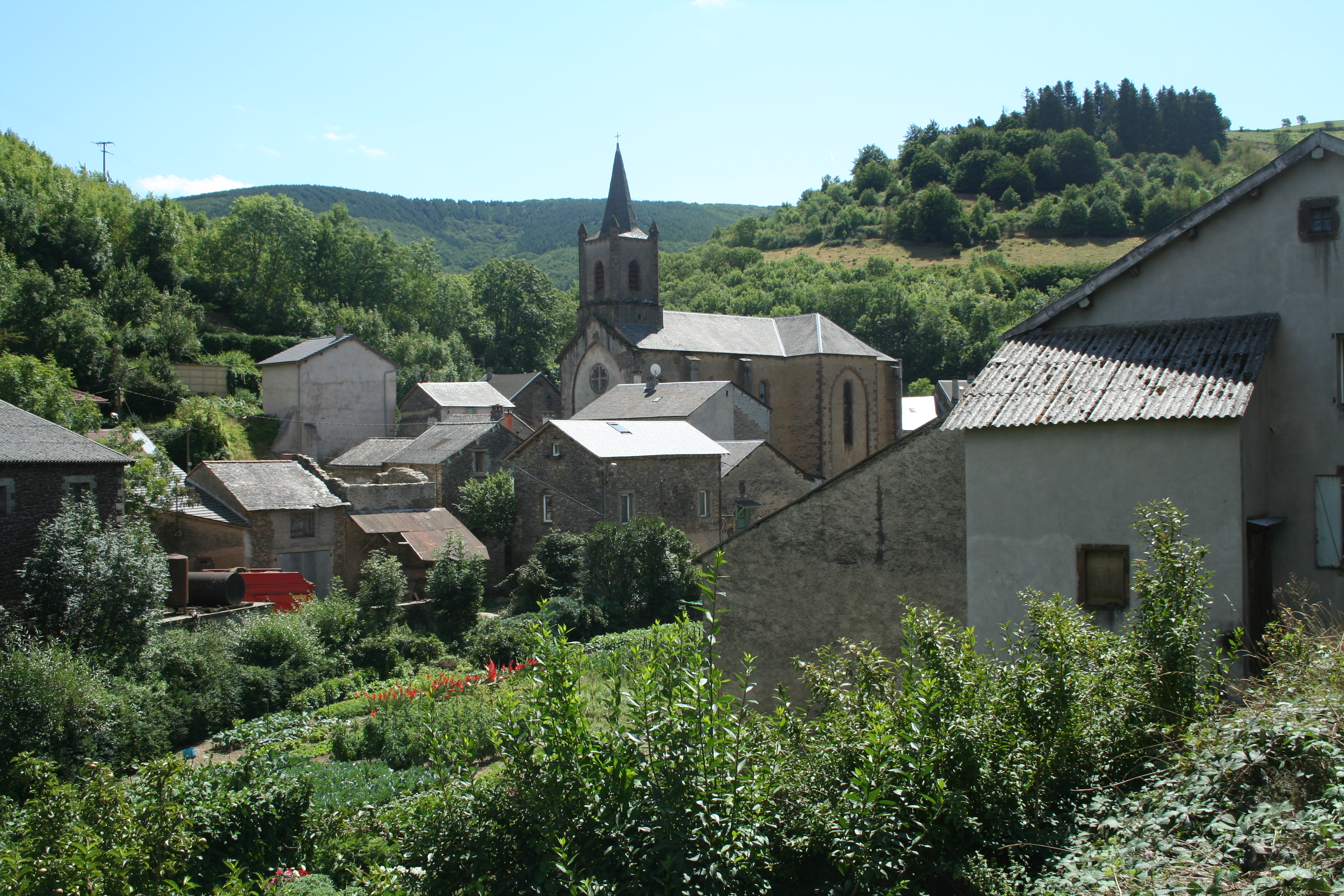 Peux-et-Couffouleux (Aveyron) - vue générale de Couffouleux.